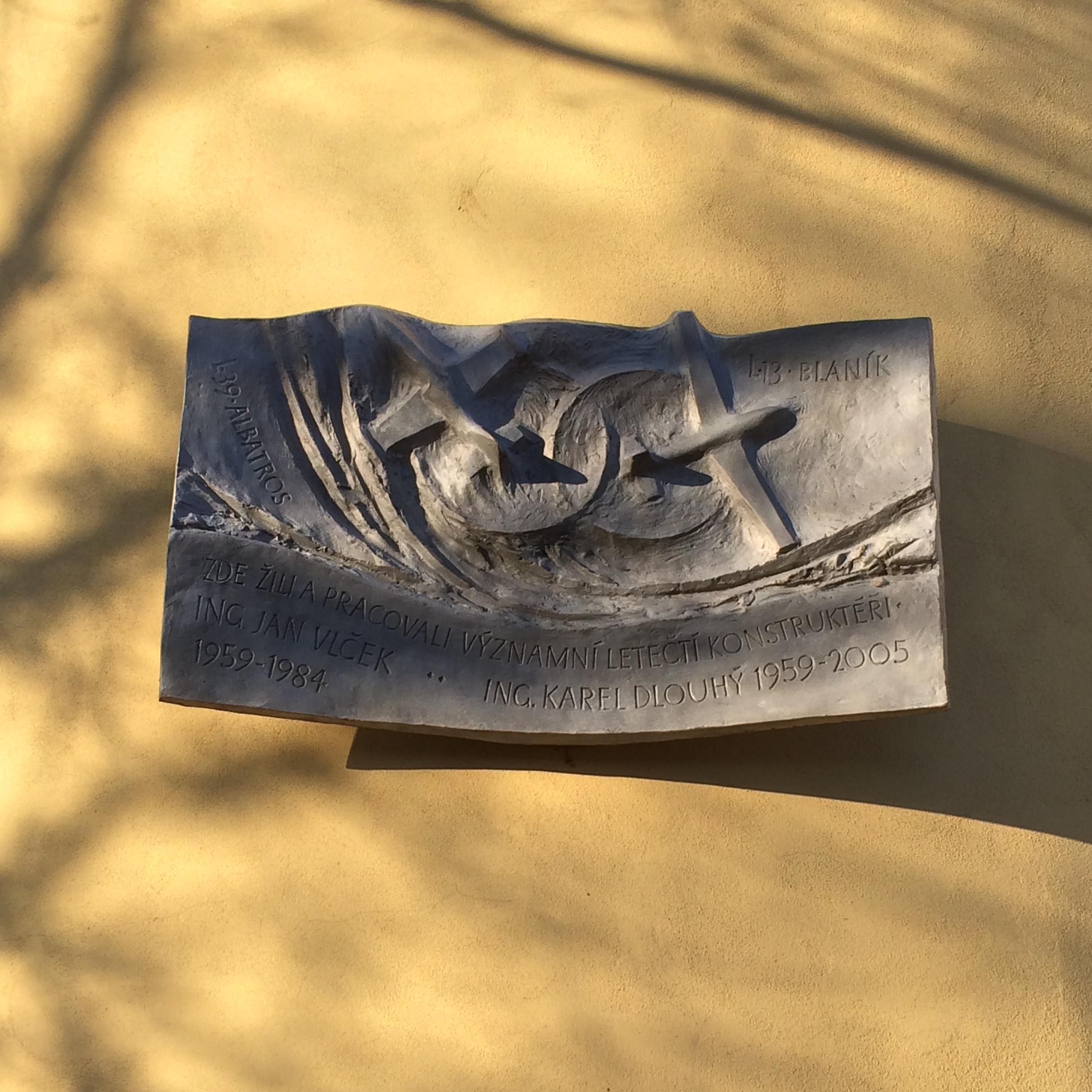 Pamětní deska leteckých konstruktérů Ing. Jana Vlčka a Ing. Karla Dlouhého na domě, kde žili a pracovali, v Praze - Letňanech v ulici Kladrubská.